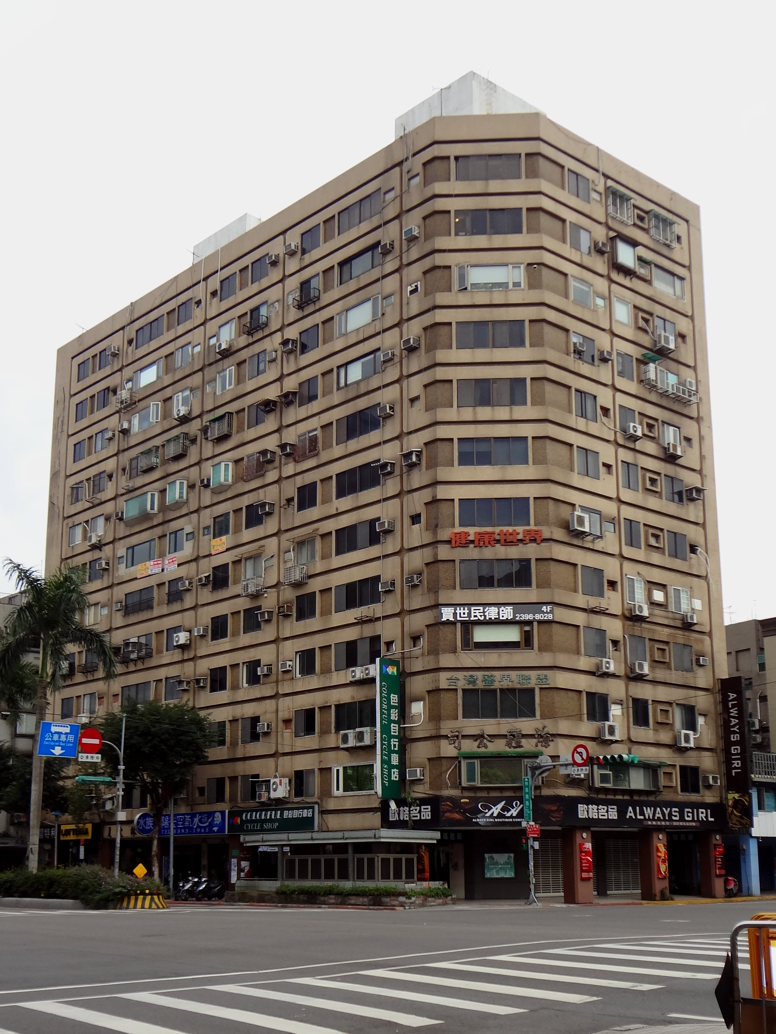 愛林大廈，位於臺北市中正區仁愛路一段4、6號。台灣醫界聯盟基金會總部位於4號3樓。